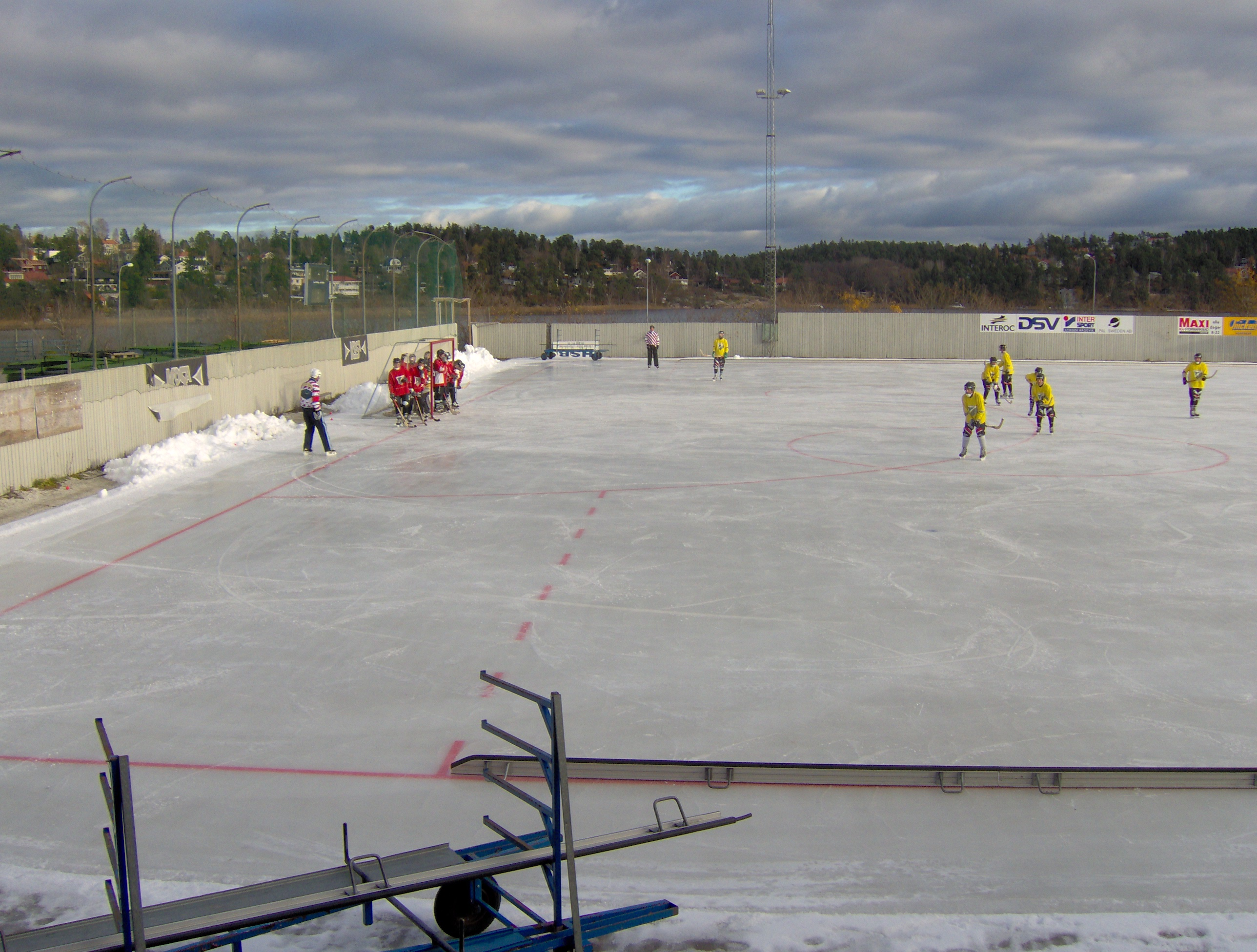 Sollentunavallen. A corner situation.